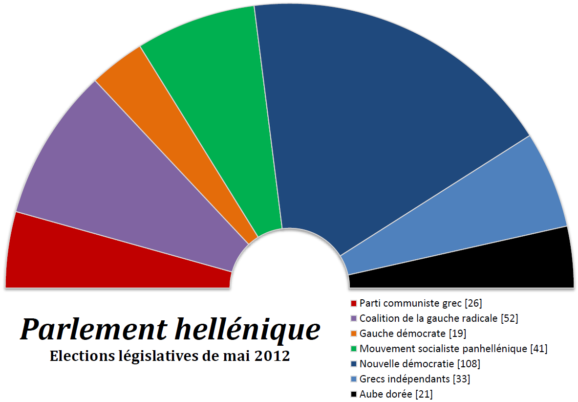 Composition politique du Parlement hellénique après les élections de mai 2012.